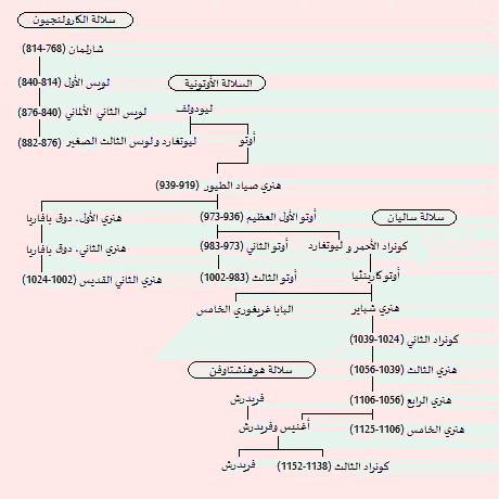 شجرة نسب السُلالة الأوتونية.